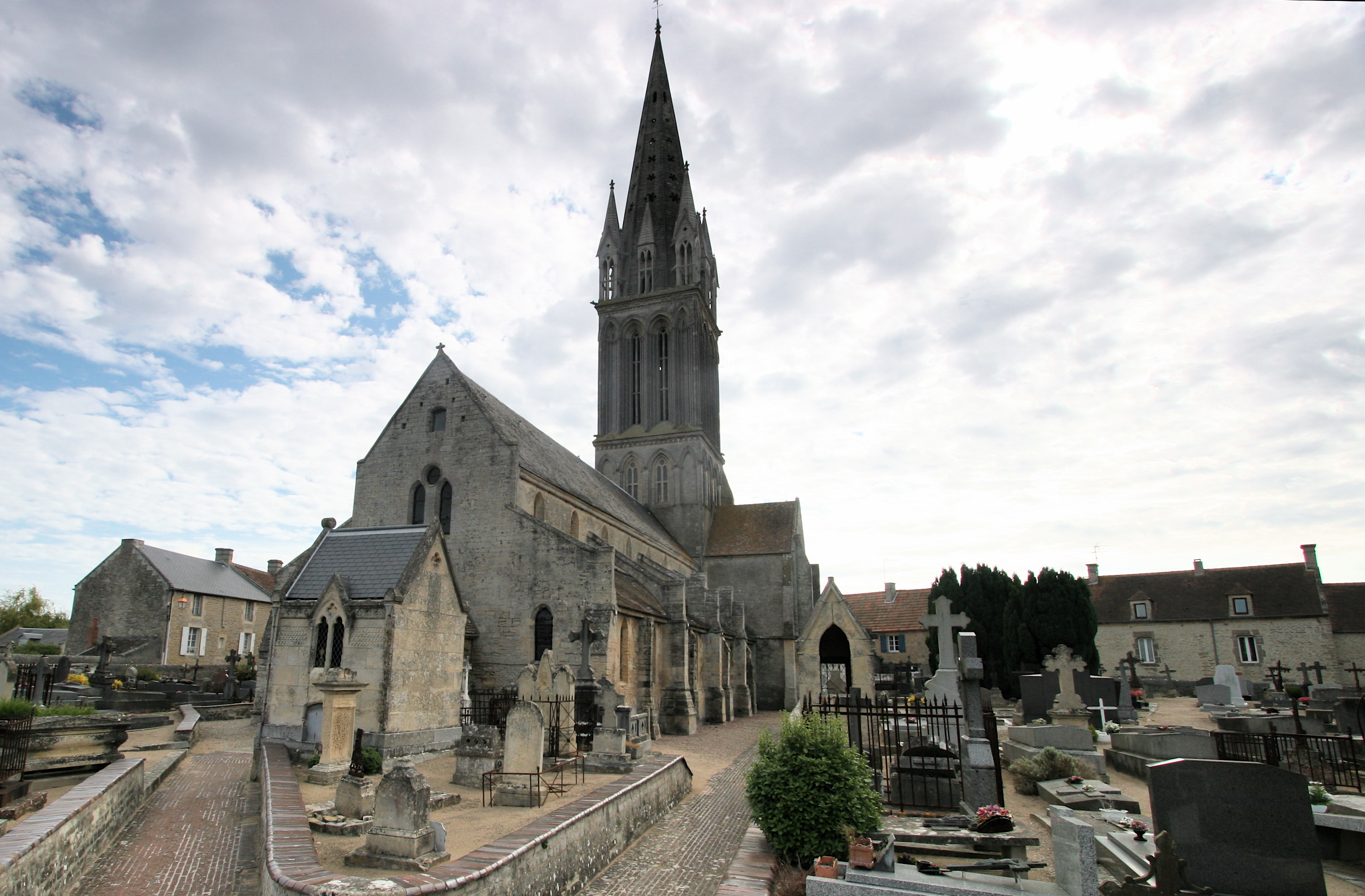 Eglise de Langrune sur Mer, Calvados, France